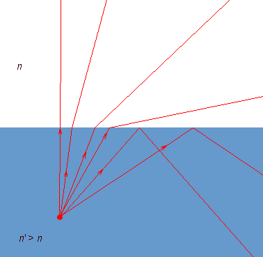 Schéma : limite de réfraction (réflexion totale) (Schéma personnel) Catégorie:Schéma de physique